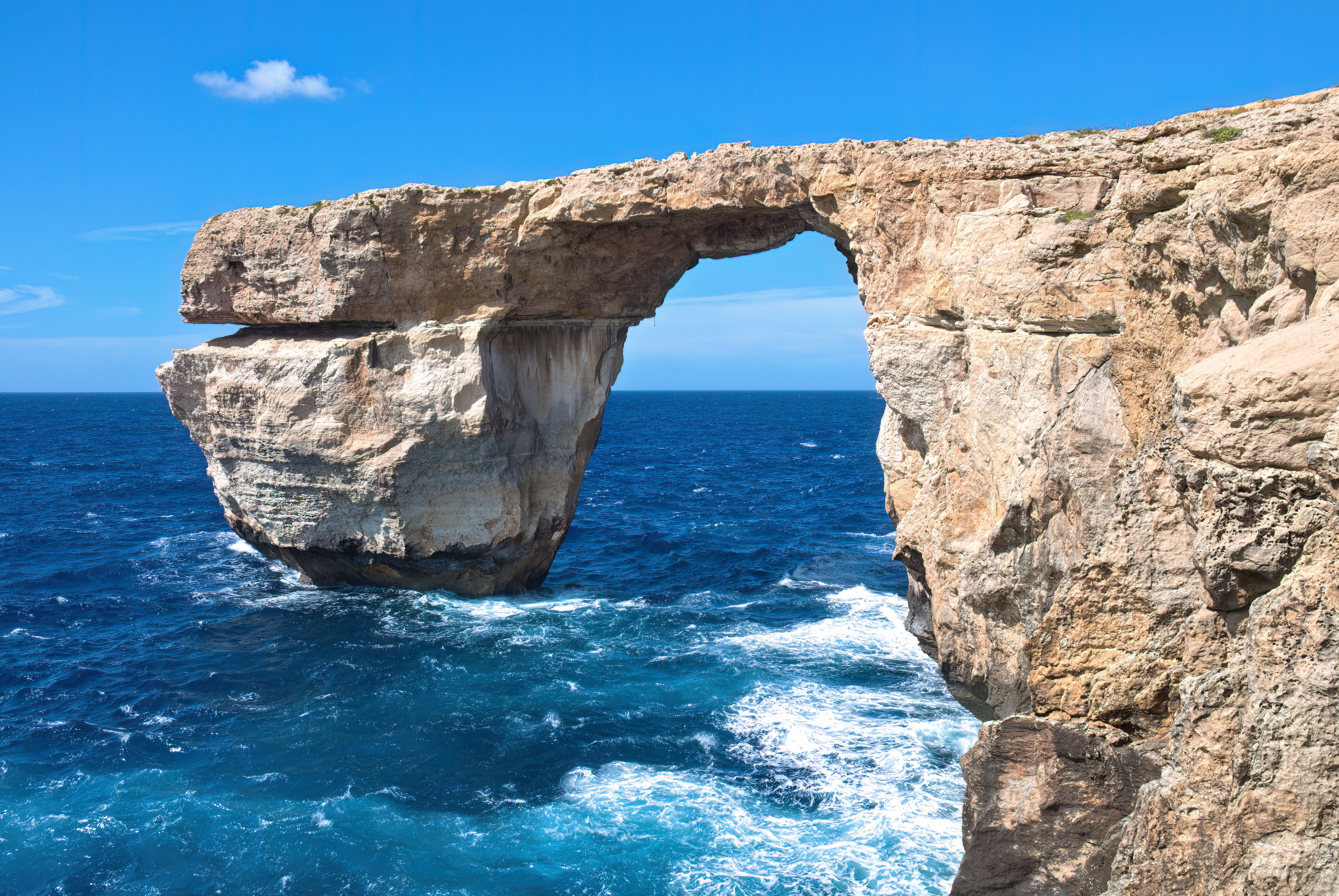 Malta: Gozo, Azure Window